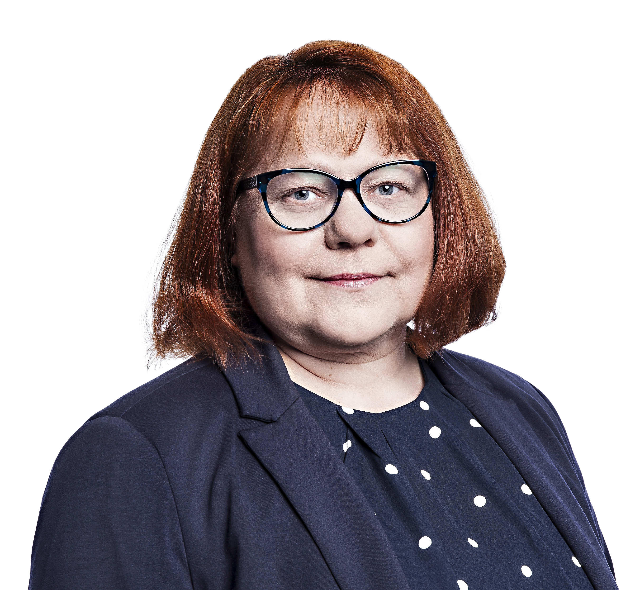 Maire Forsel